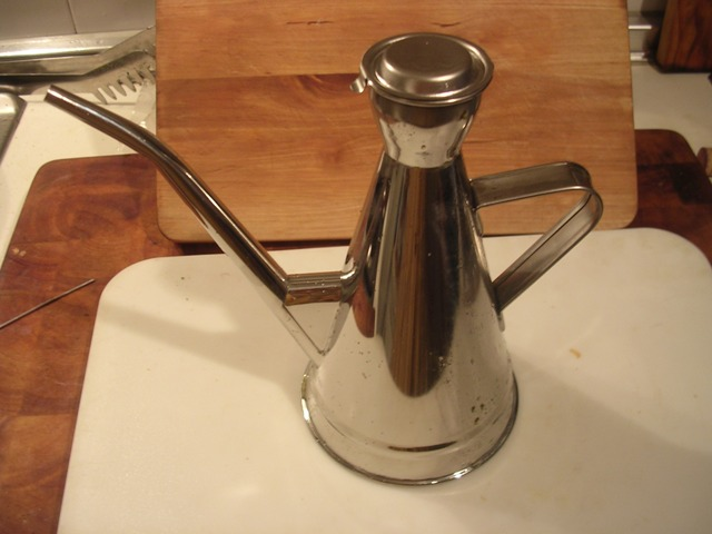 Alcuza (Oil recipiente)